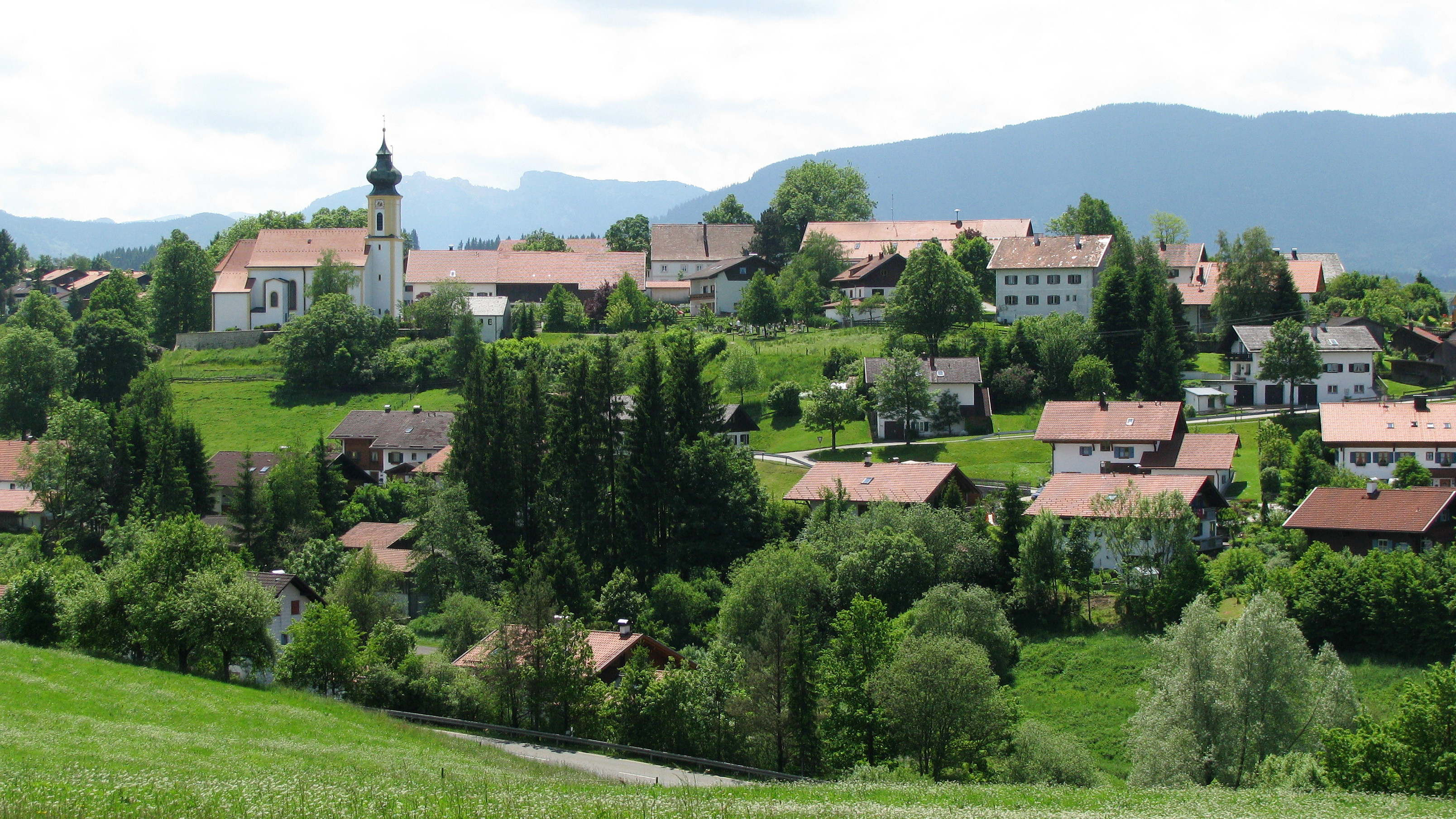 Wildsteig, Ortsansicht von Norden